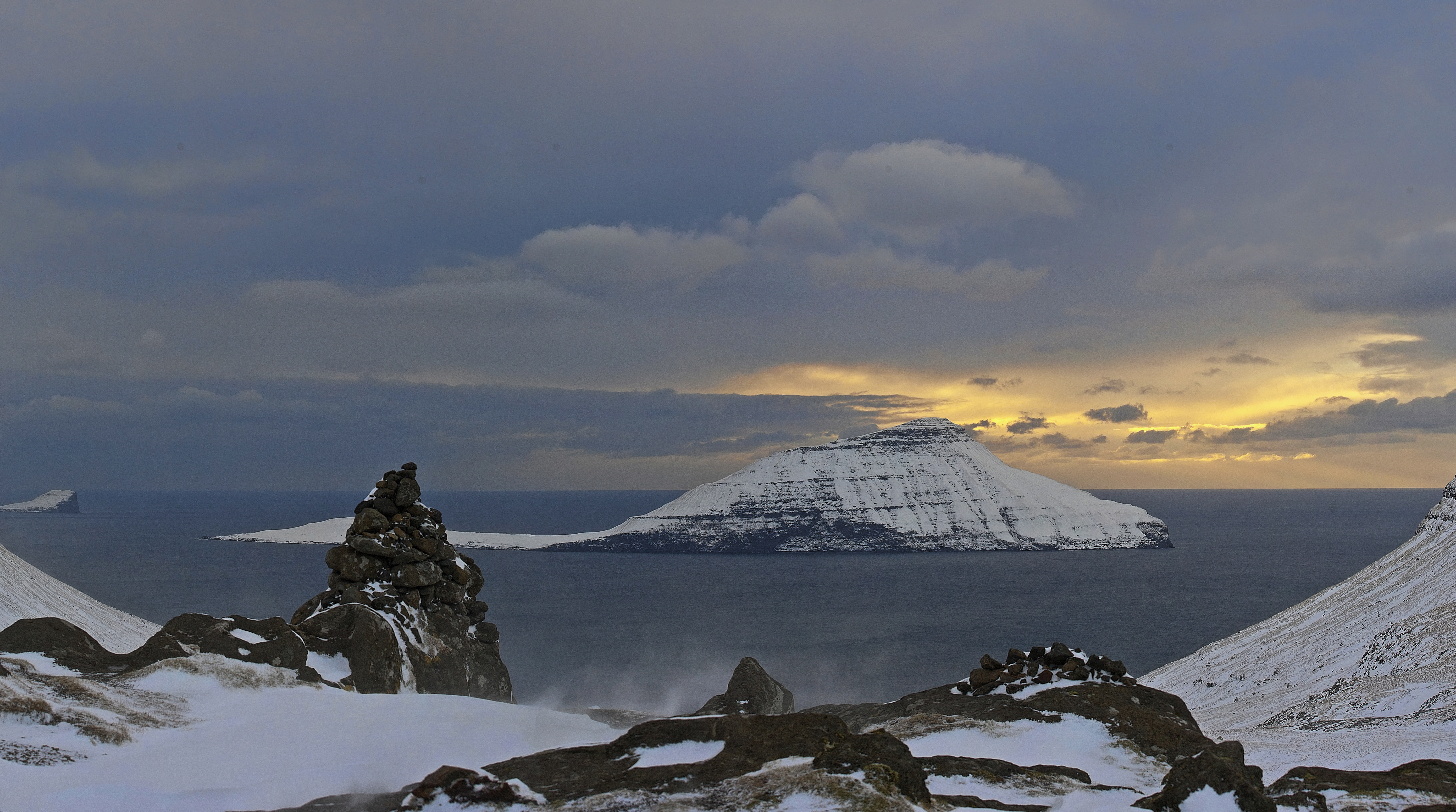 Norðadalsskarð